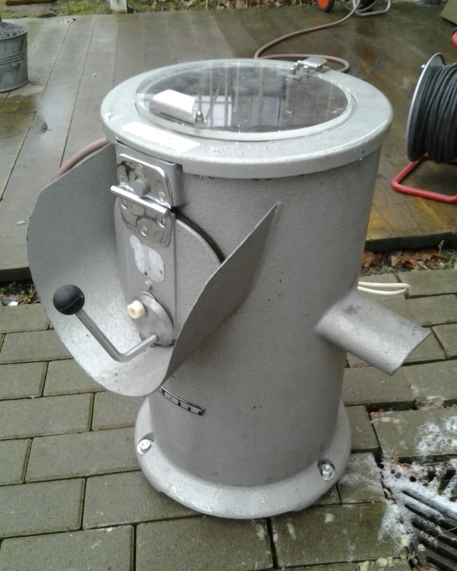 Eine Kartoffelschälmaschine der Marke "Flott" nach der Benutzung